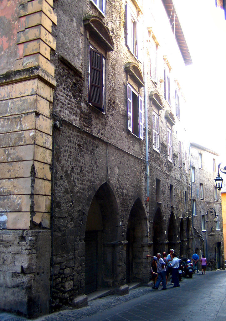 Anagni, Lazio, Italia